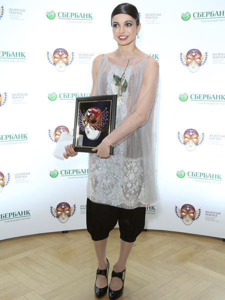 Диана Вишнева фото Авраменко